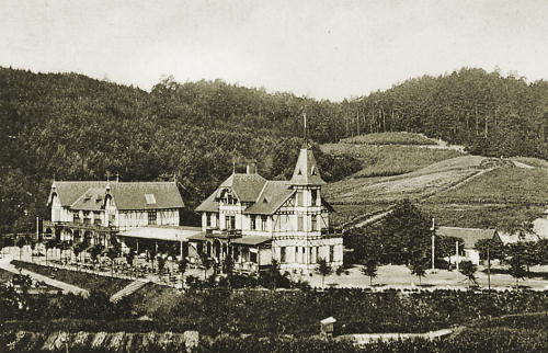 Leśny Młyn, Gdańsk-Oliwa.